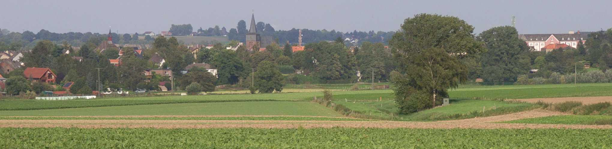 Panoramaansicht von Linnich, NRW